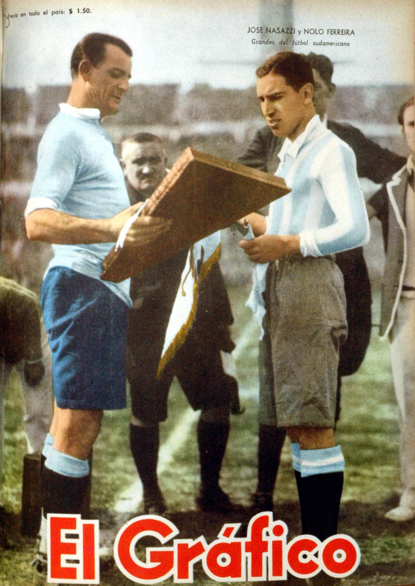 El Grafico del 27 de Enero de 1956. Edicion 1901